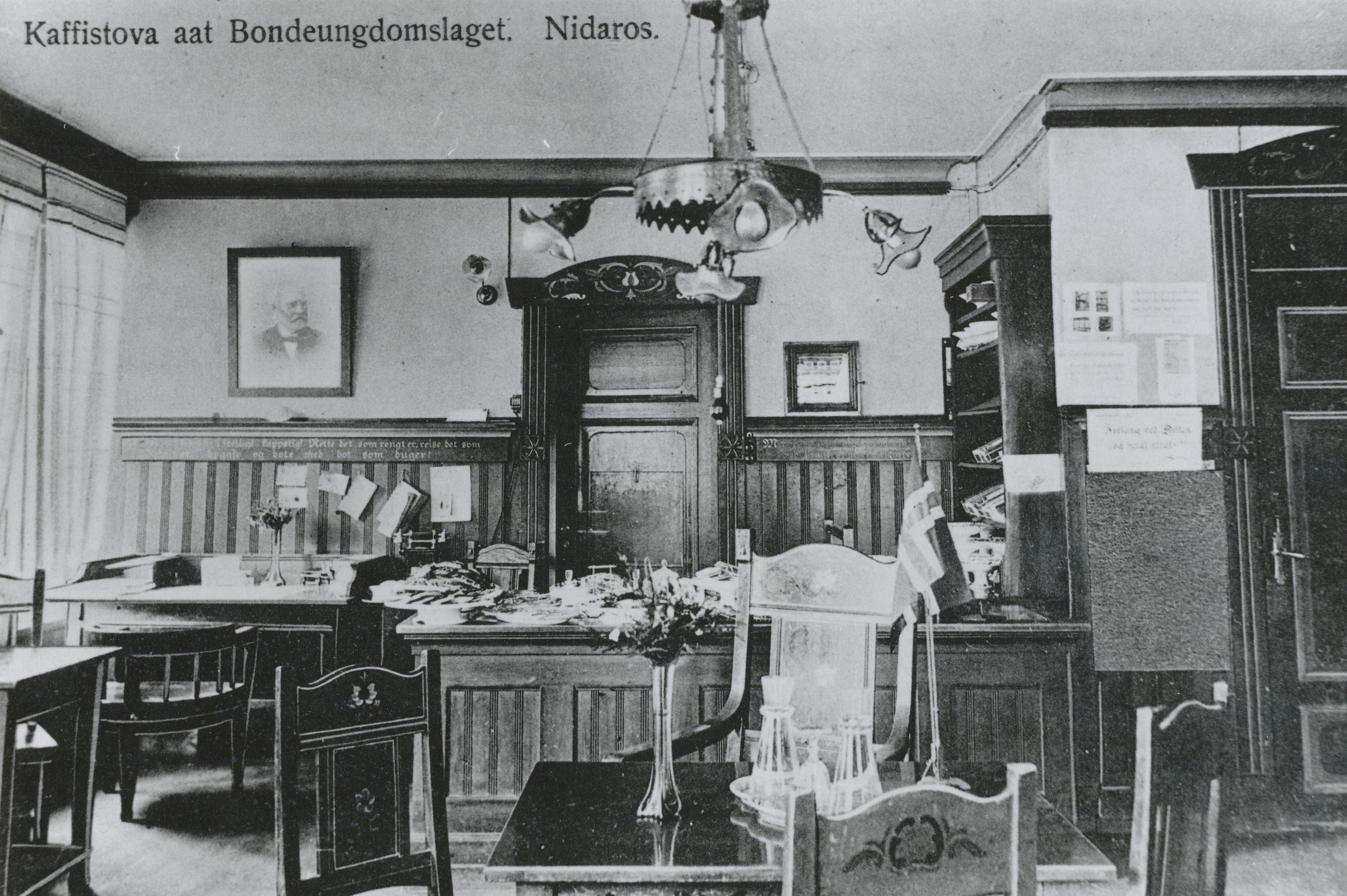 Nordre gate 26. Kaffistova. Bondeungdomslaget i Nidaros (grunnlagt 1904) opprettet Kaffistova i 1906. Fra et postkort. Ukjent fotograf og ukjent år.